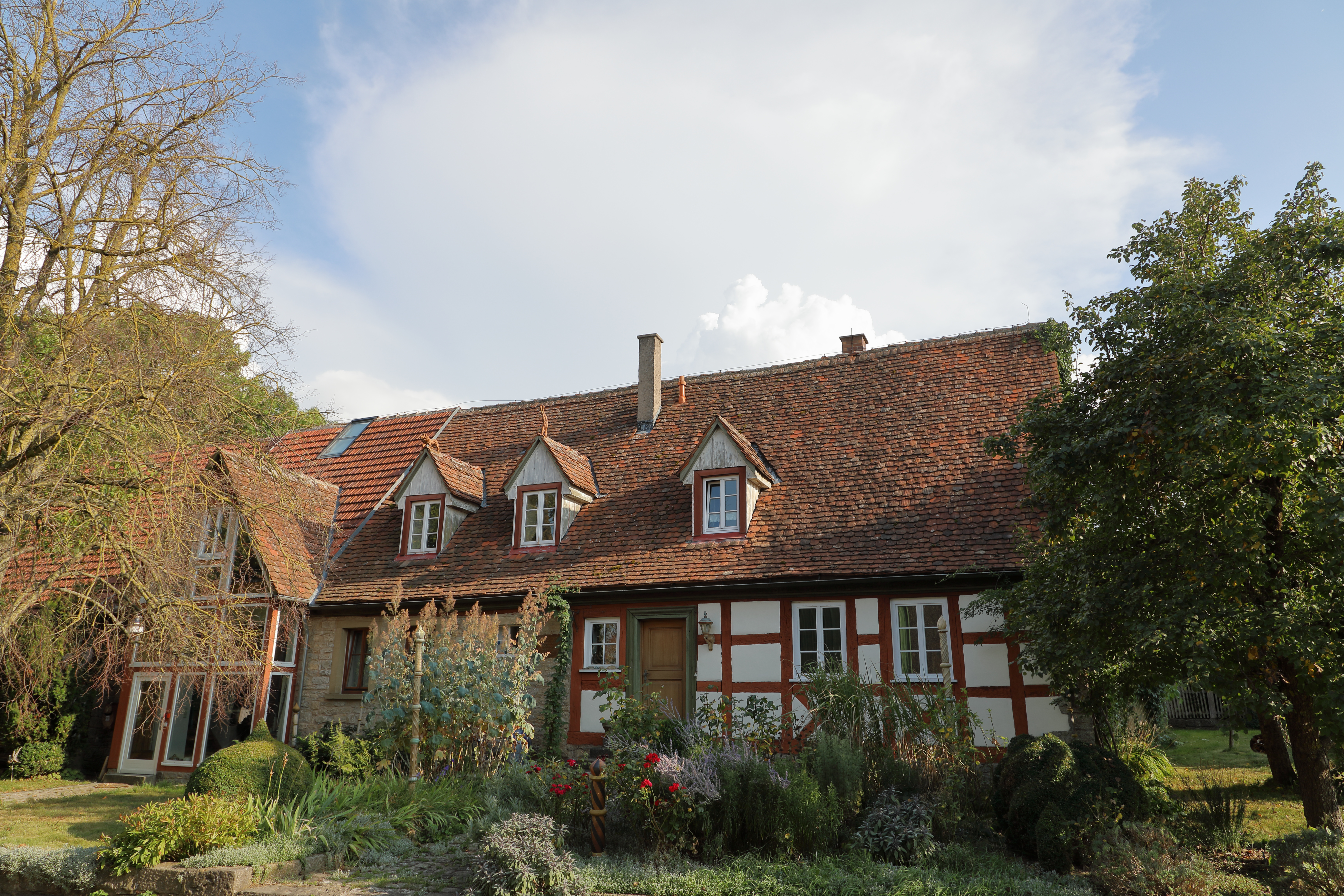 Der Weiler Hof Aischland oberhalb von Weikersheim.